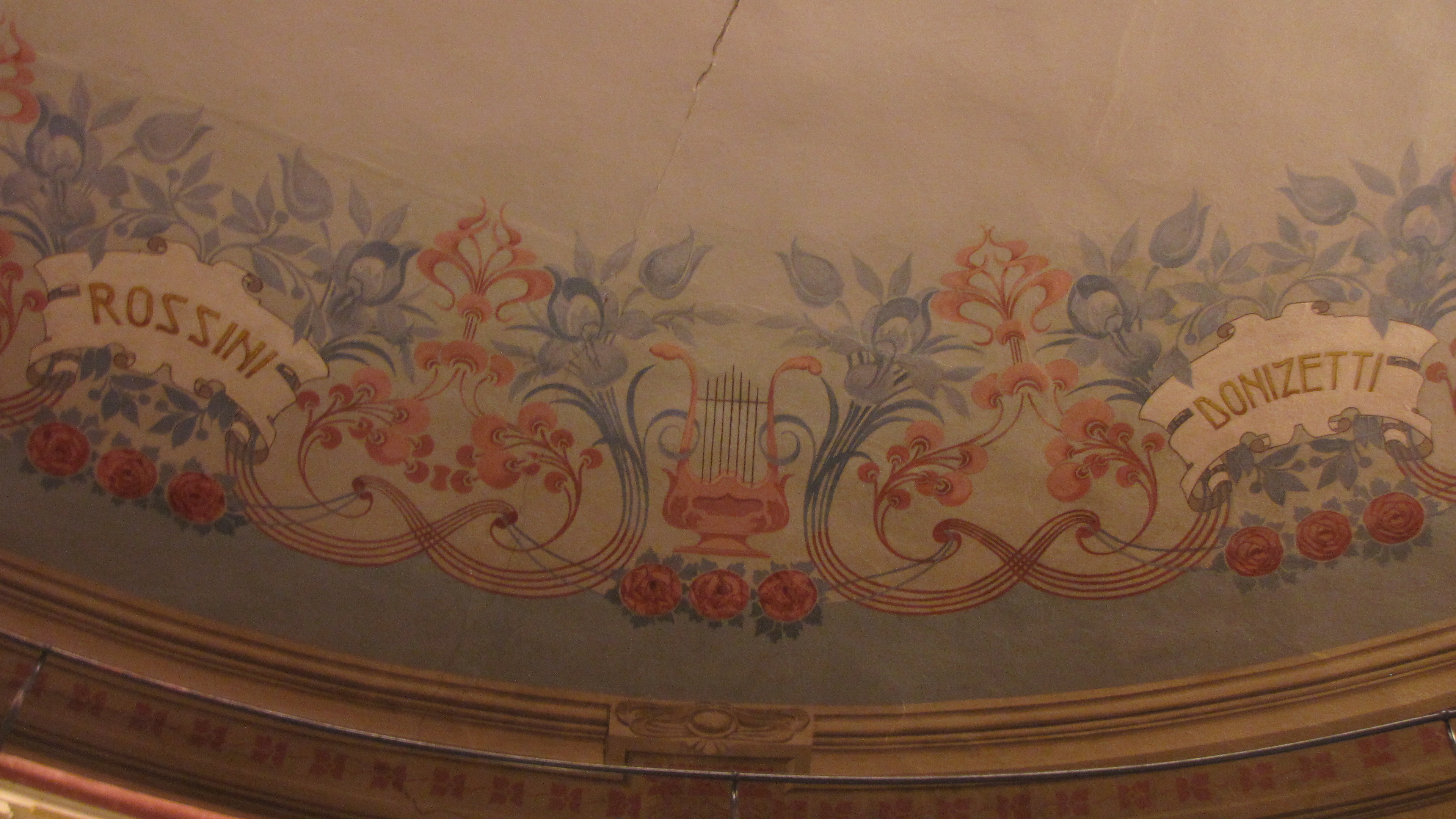 Parziale del soffitto del Tetro comunale